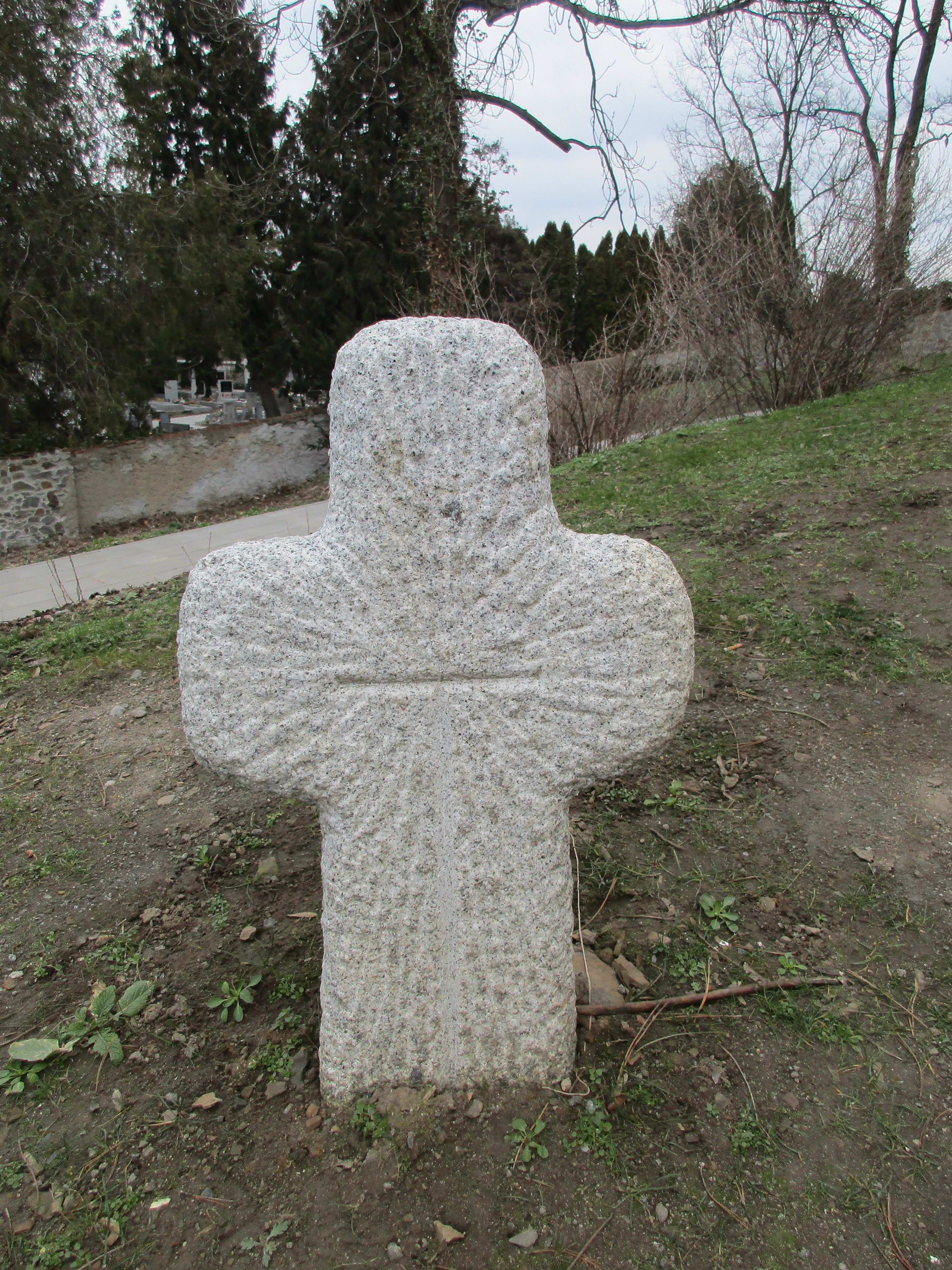 Křížová cesta Praha Modřany, zastavení č.13